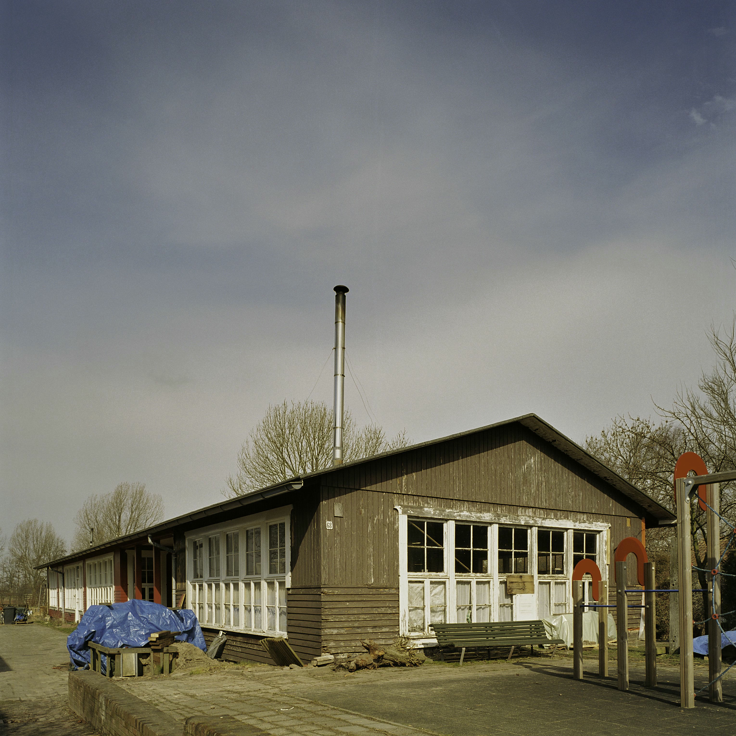 Finse School: Overzicht houten schoolgebouw (opmerking: Gefotografeerd voor Monumenten In Nederland Noord-Holland)